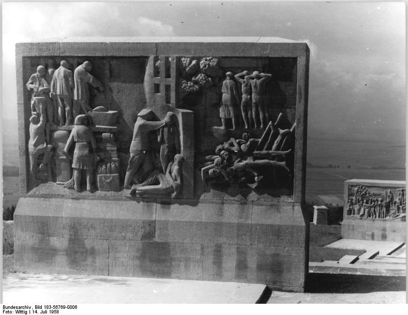 Gedenkstätte Buchenwald, Stelenweg, Stelen Zentralbild Wittig 14.7.1958 Mahnmal Buchenwald geht seiner Vollendung entgegen UBz: Blick auf den Steleweg. Im Vordergrund die Stele 5 symbolisiert die Qualen der Häftlinge beim Bau des damaligen Gustloff-Rüstungswerkes.